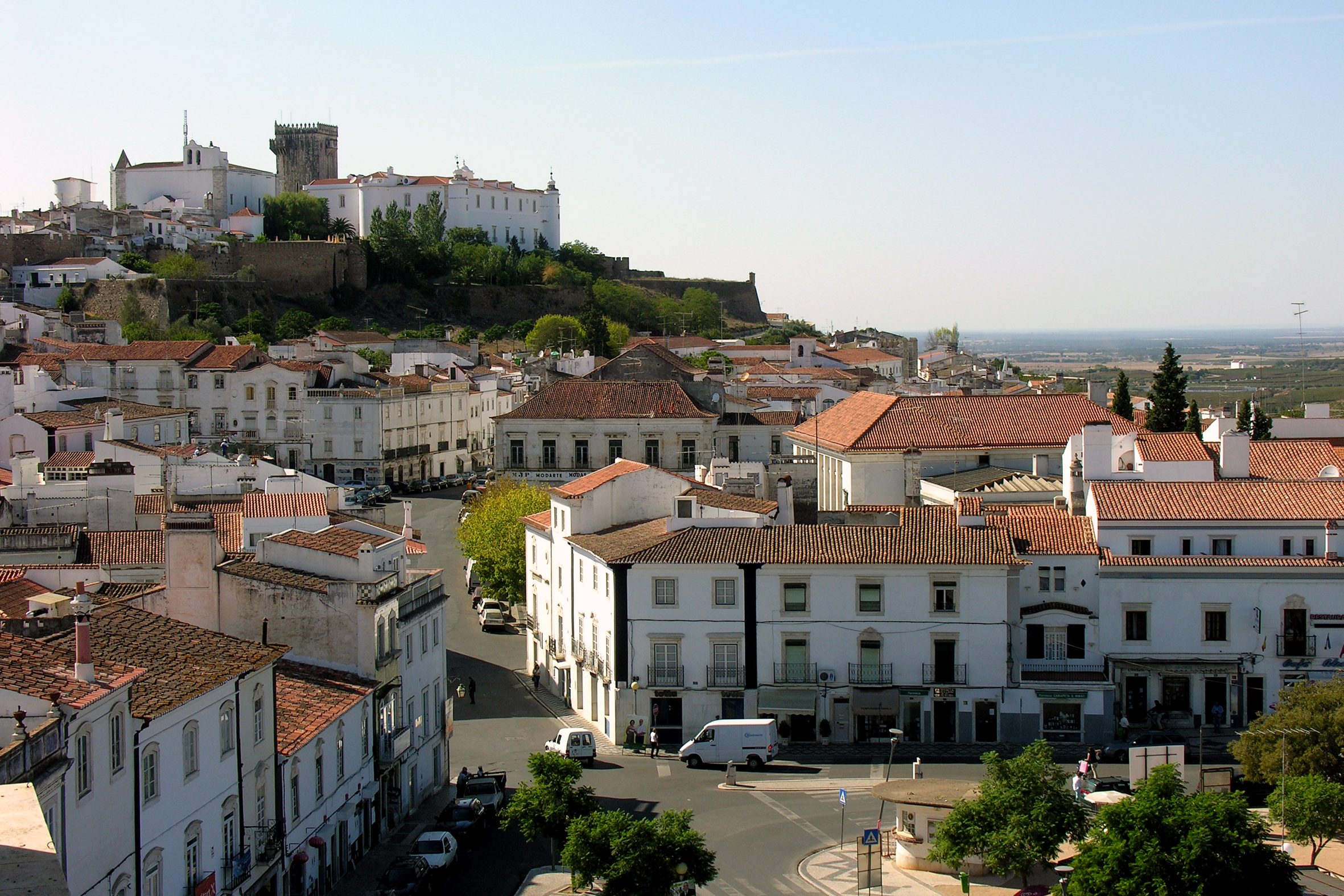 View of Estremoz, Portugal